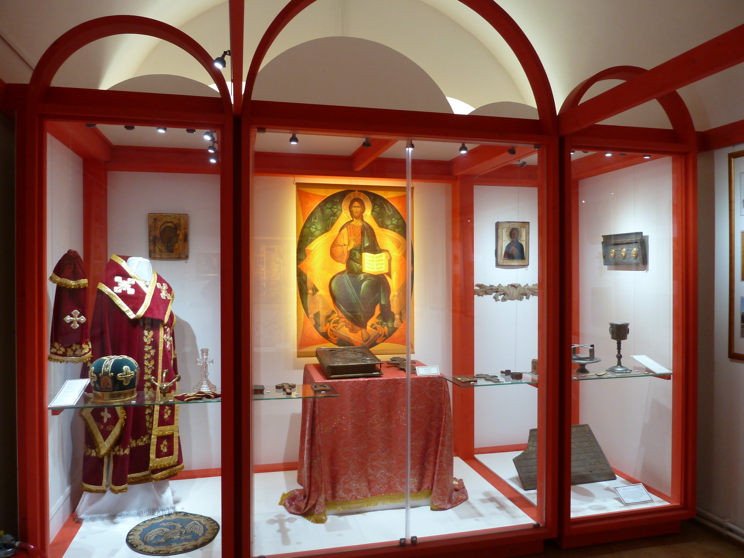 Экспозиция истории Православия на Орловщине